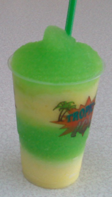 En Slush Ice